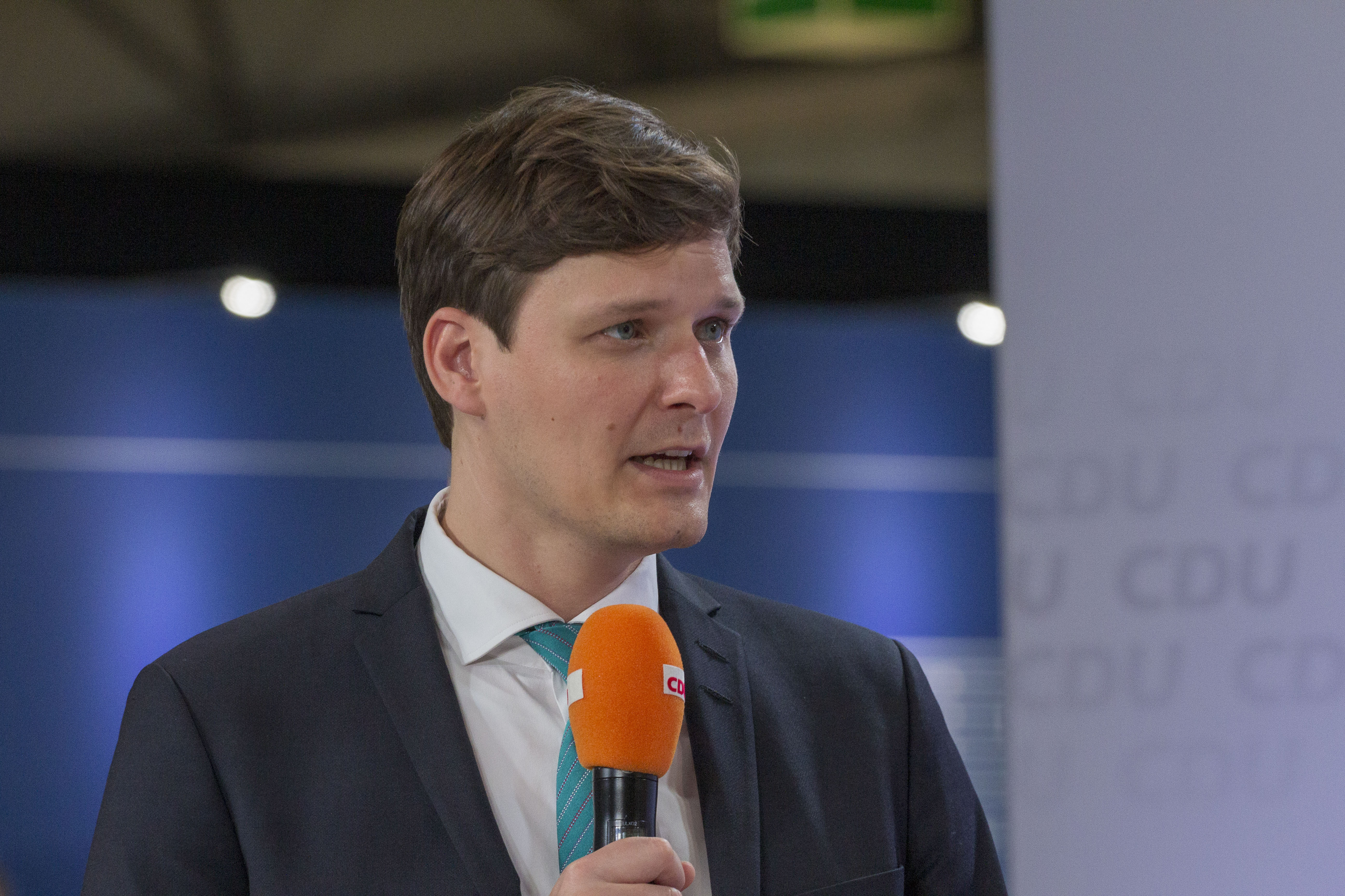 Conrad Clemens auf dem CDU Parteitag 2019 am 22. November 2019 in Leipzig.